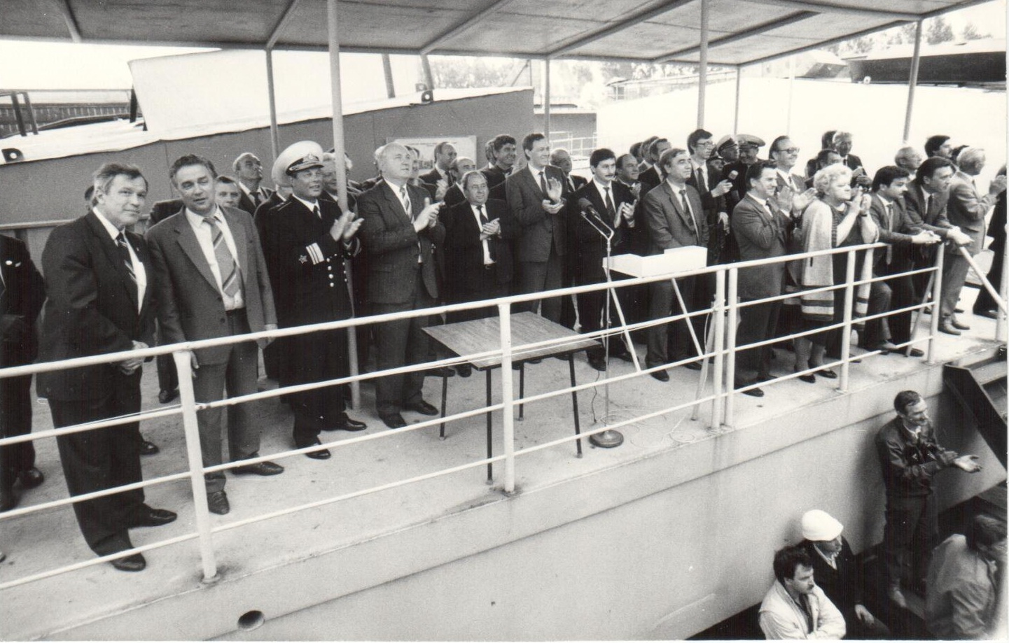 23.08.91 Спуск на воду НИС "Академик Пилюгин"